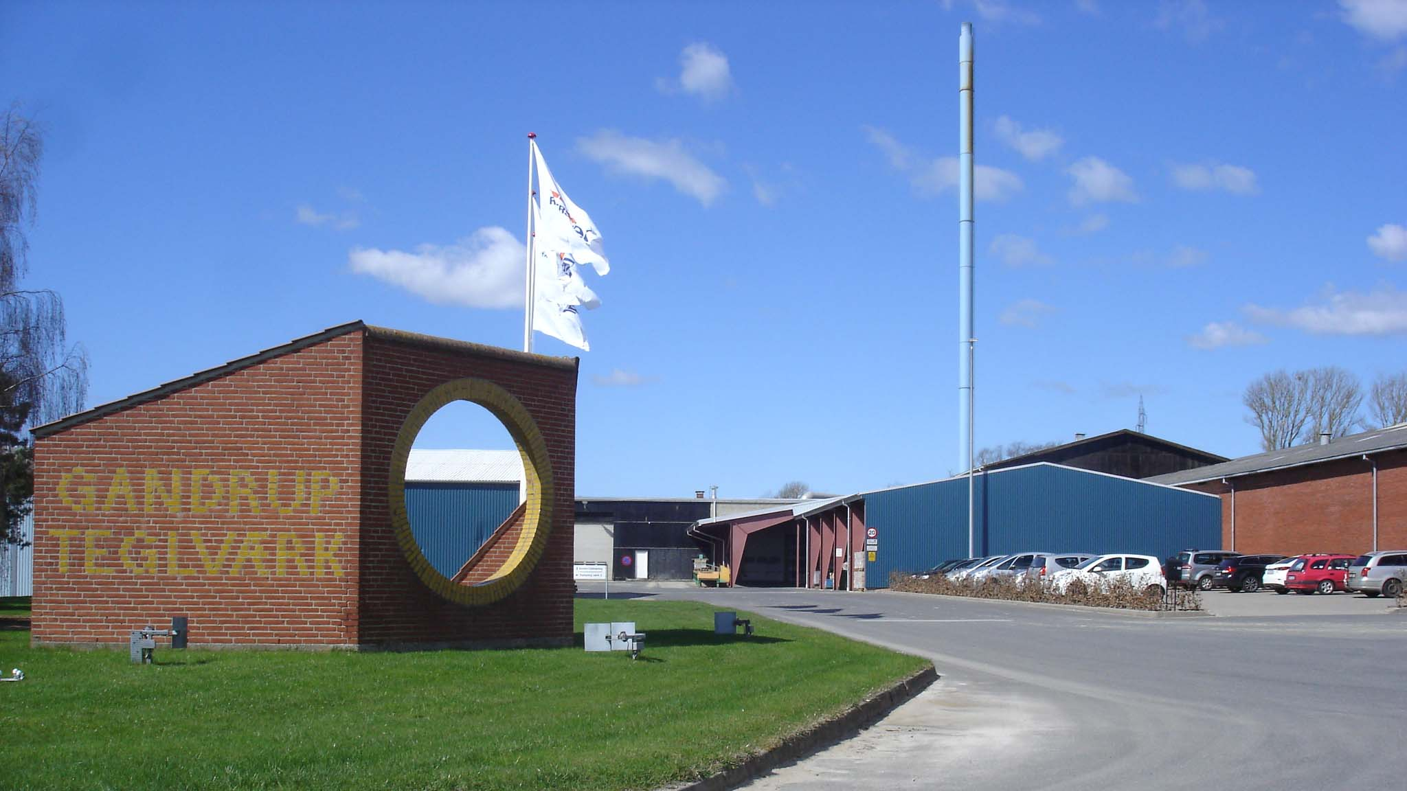 Gandrup Teglværk